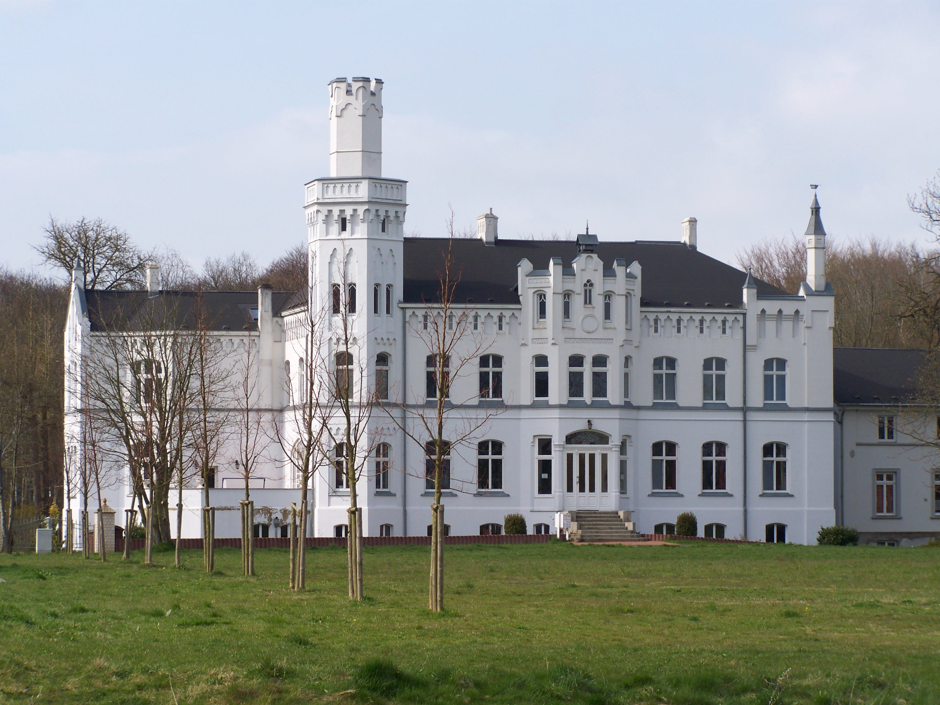 Schloss in Groß Kordshagen bei Stralsund